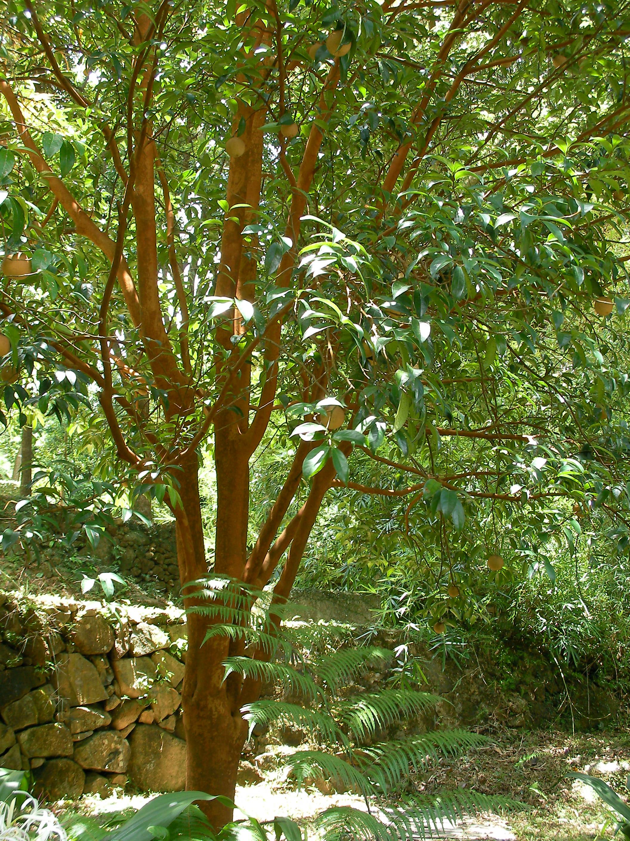 Camellia crapnelliana taken in Shing Mun Arboretum, Hong Kong